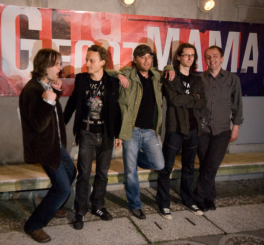 Big Foot Mama pred koncertom v Križankah, 14. maja 2009. Od leve proti desni: Zoran Čalić, Danijel Gregorič, Grega Skočir, Alen Steržaj, Jože Habula